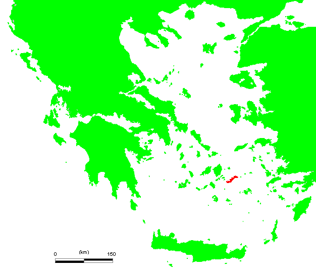 GR Amorgos.PNG (Greek island)